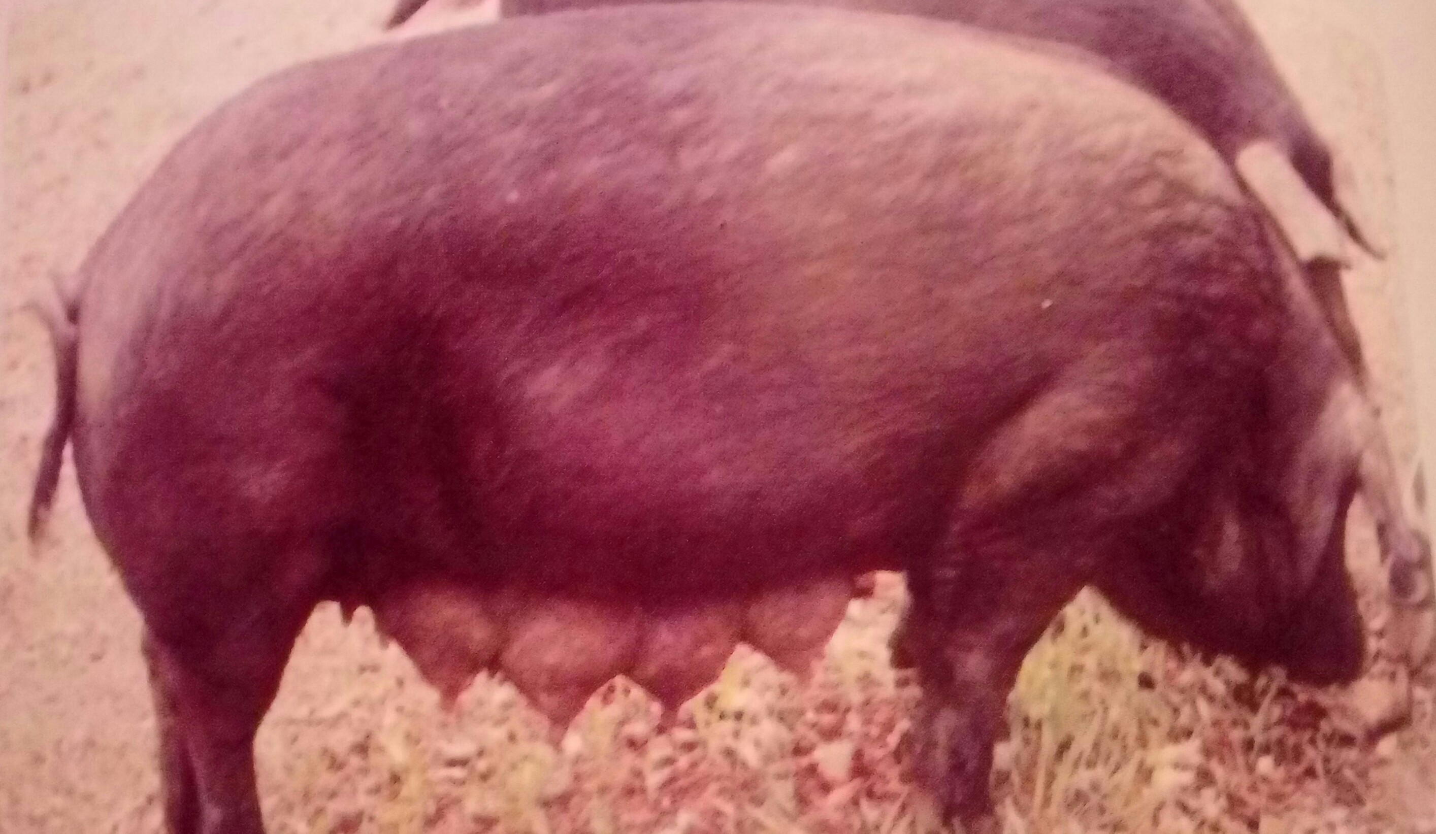 Srpski (latinica): Rasa svinje za mast i meso